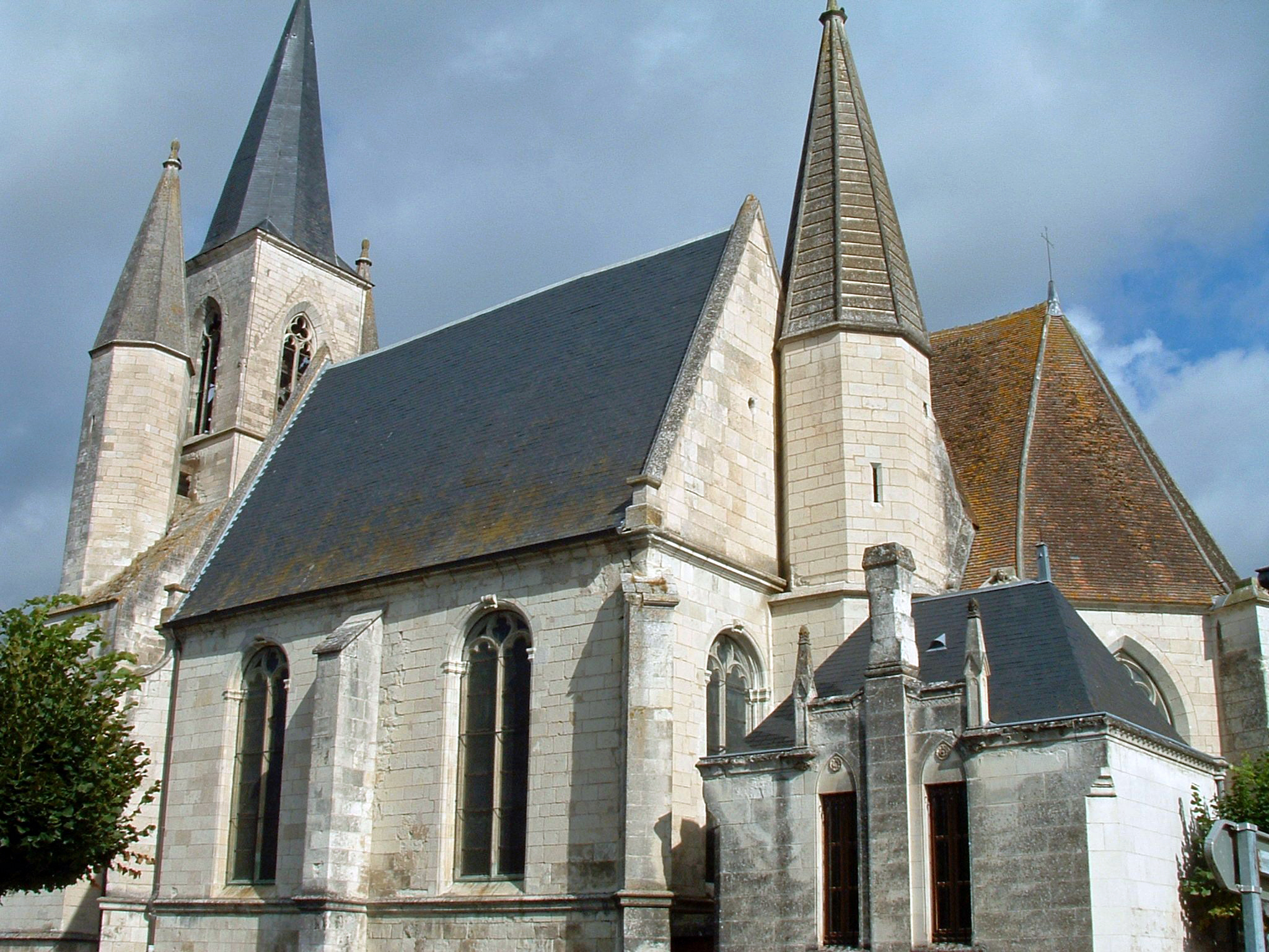 Mézières-en-Brenne - Église Sainte-Marie-Madeleine - Extérieur de la chapelle d'Anjou